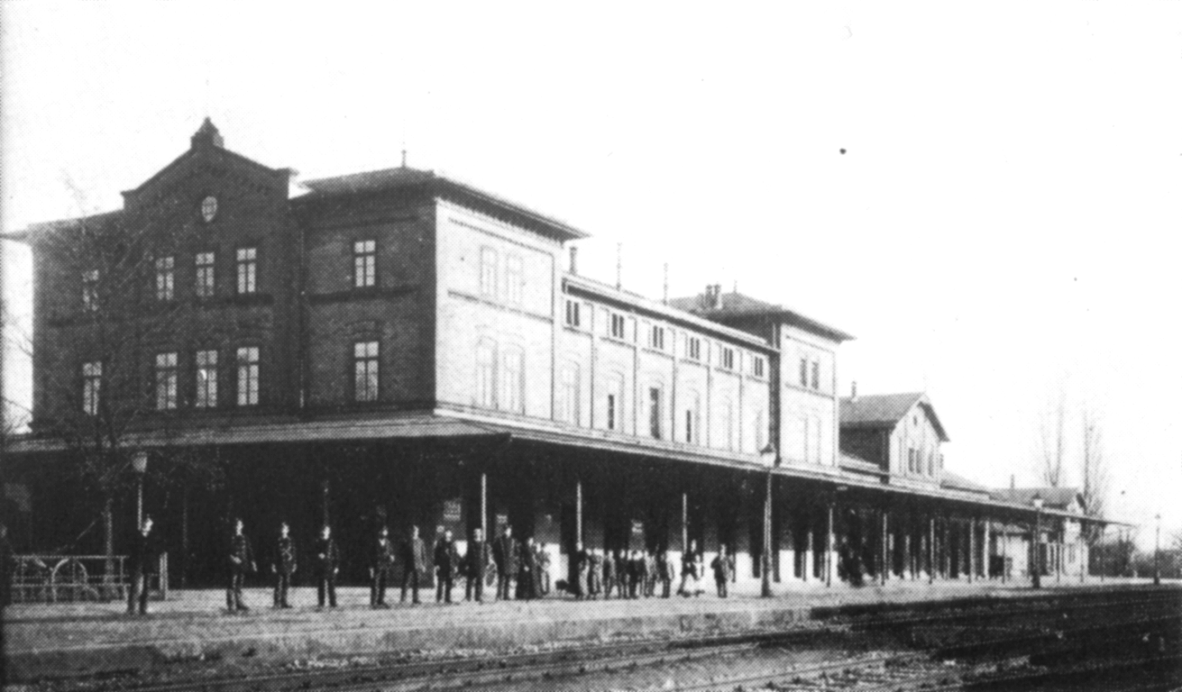 Bahnhof in Jagstfeld mit seinem ersten Empfangsgebäude.